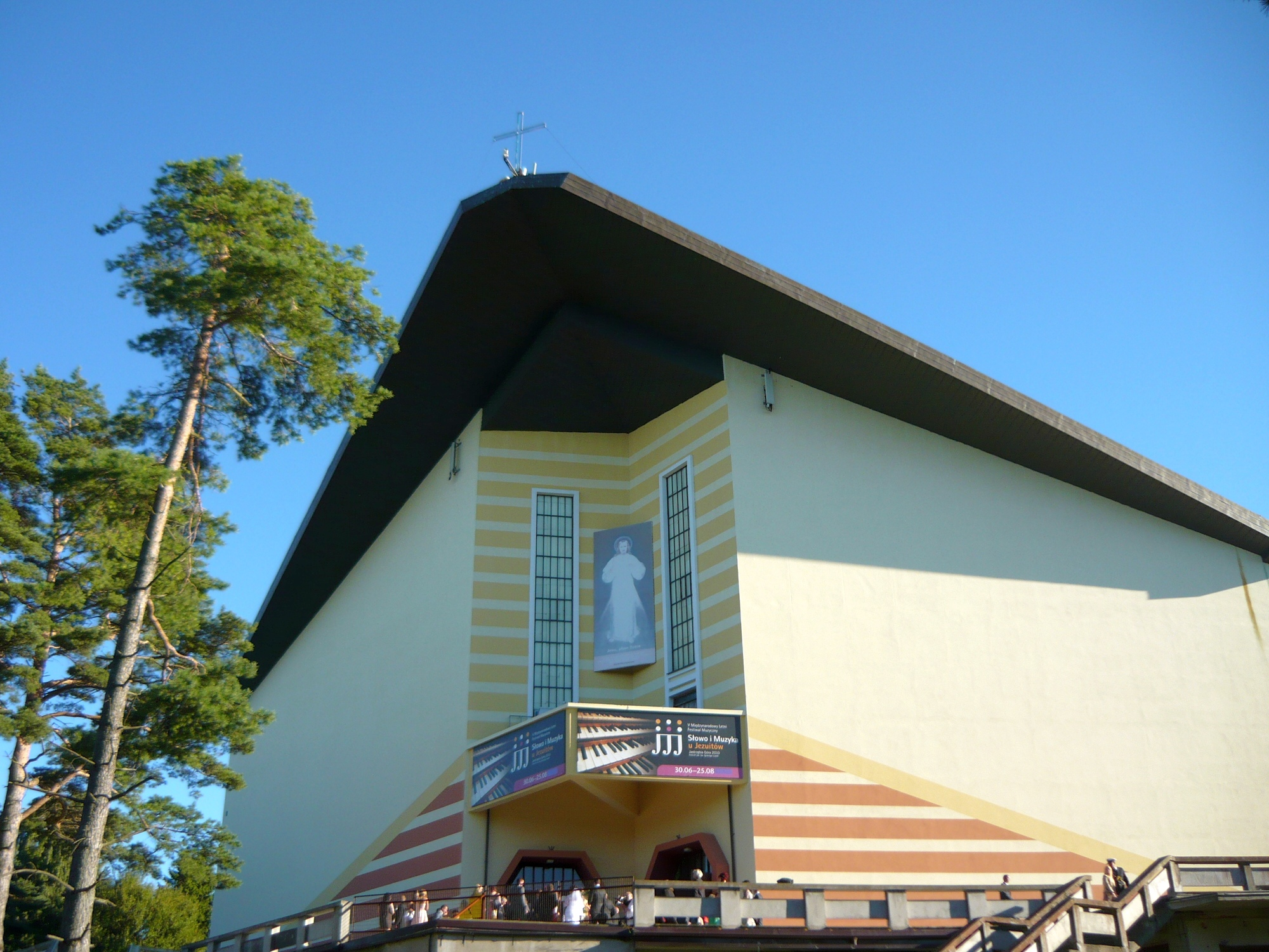 Kościół św. Ignacego Loyoli w Jastrzębiej Górze.